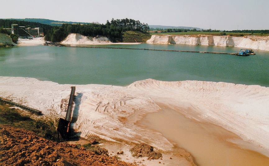 Quarsandabbau Uhry